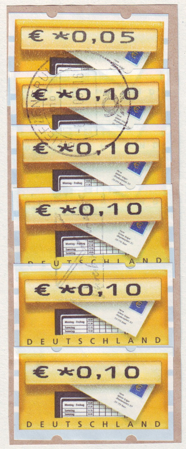 Dachziegelfrankatur der Automatenmarkenausgabe IV